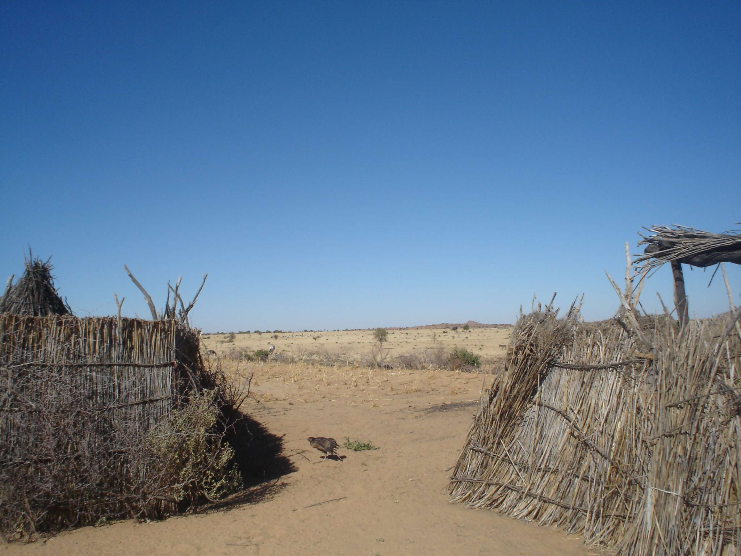 Darfur. Contesto